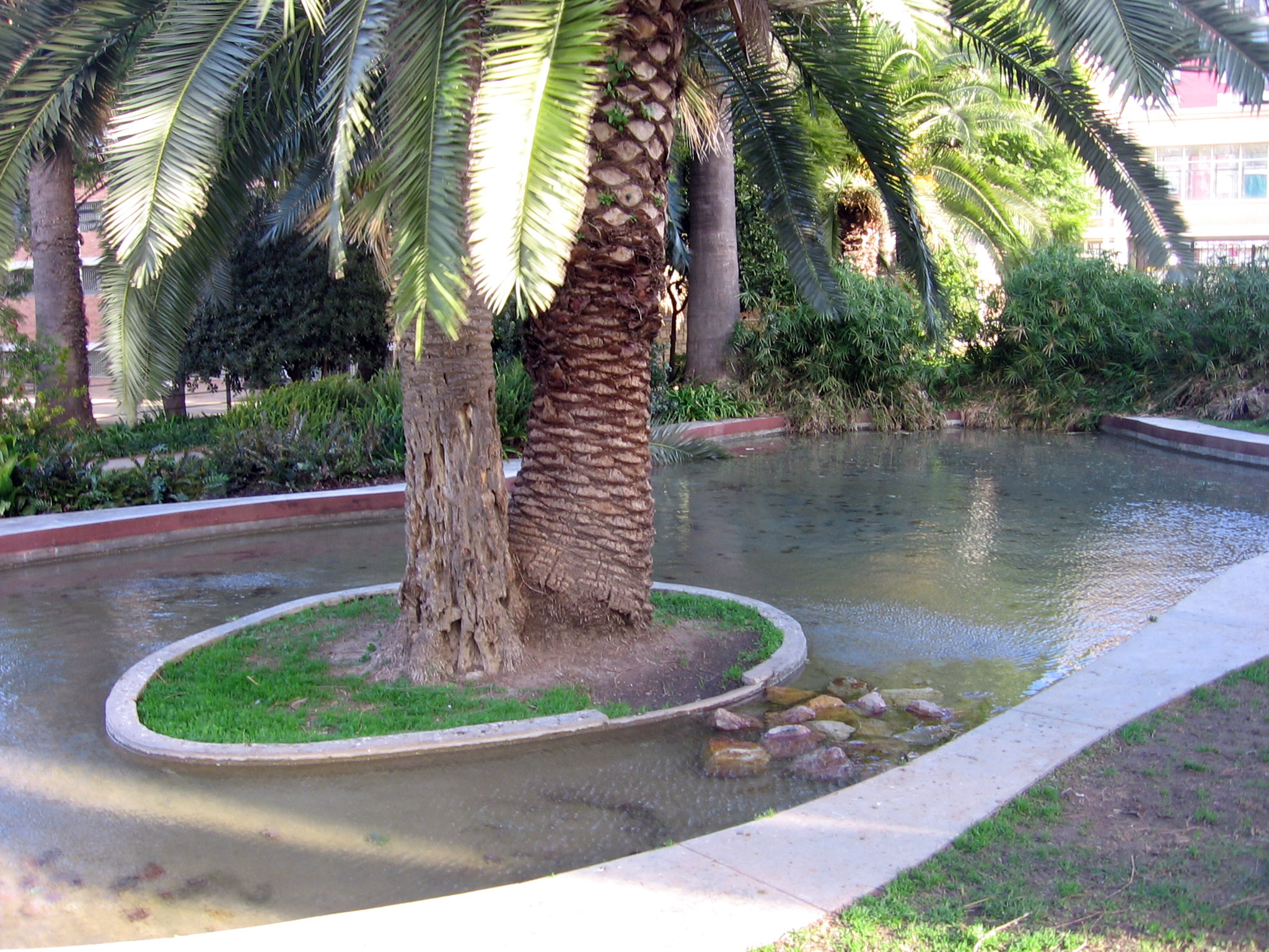 Jardín de los Derechos Humanos, Barcelona.